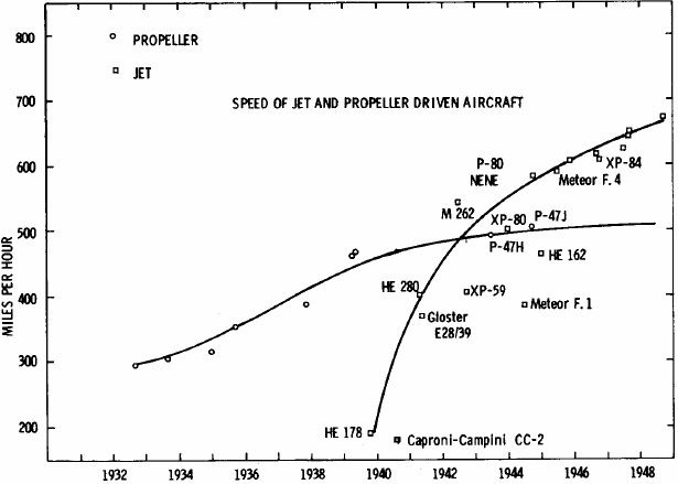 Abweichen vom idealtypischen S-Kurven-Verlauf von Technologien in der Praxis